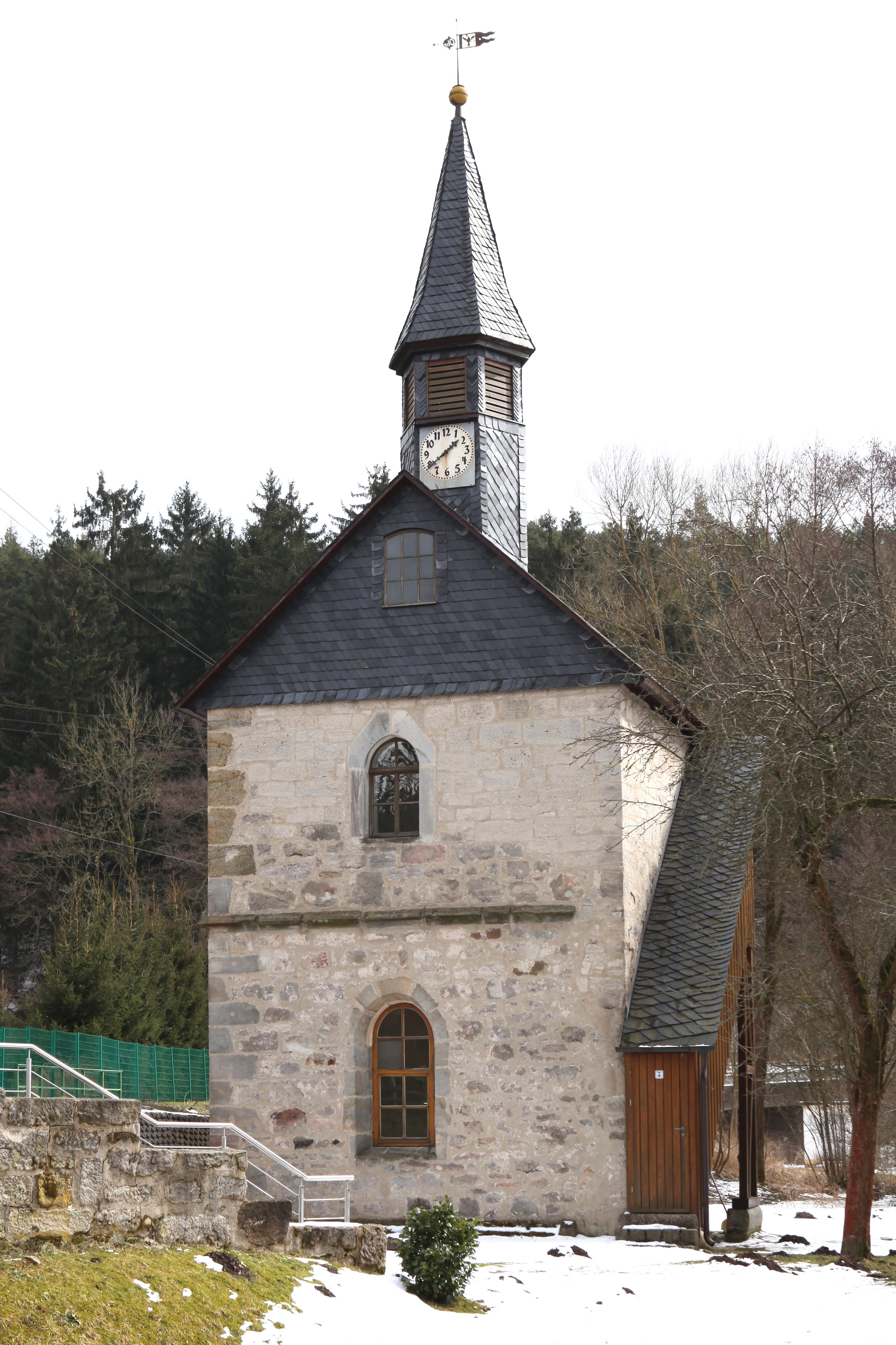 St. Wolfgang Kapelle in Oberrod, OT von Nahetal-Waldau, Landkreis Hildburghausen